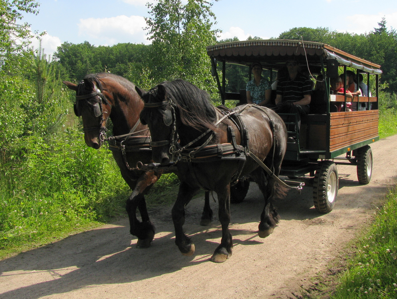 Drongengoedbos